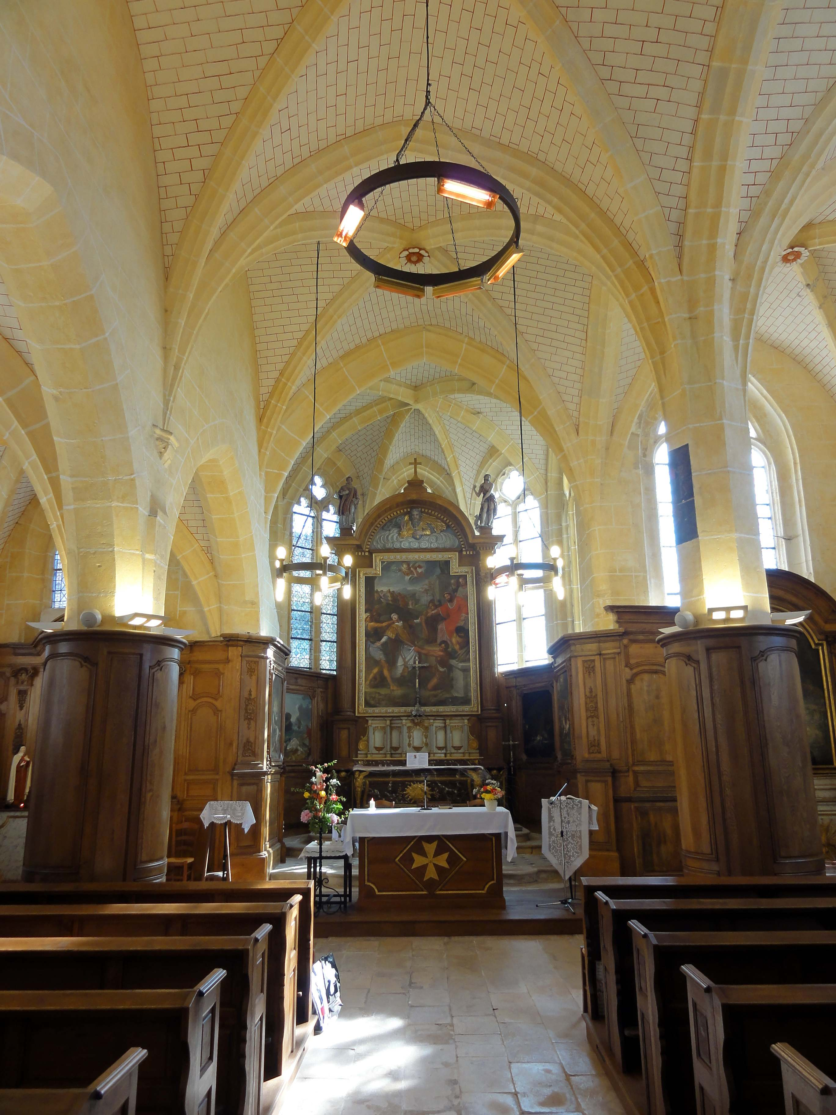 Interieur de l'église (voir titre).